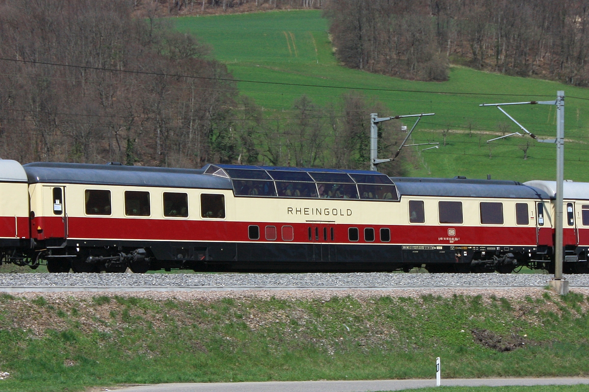 Voiture panoramique Rheingold 1962 dans la composition d'un train affrété à Sissach sur la ligne de l'Hauenstein